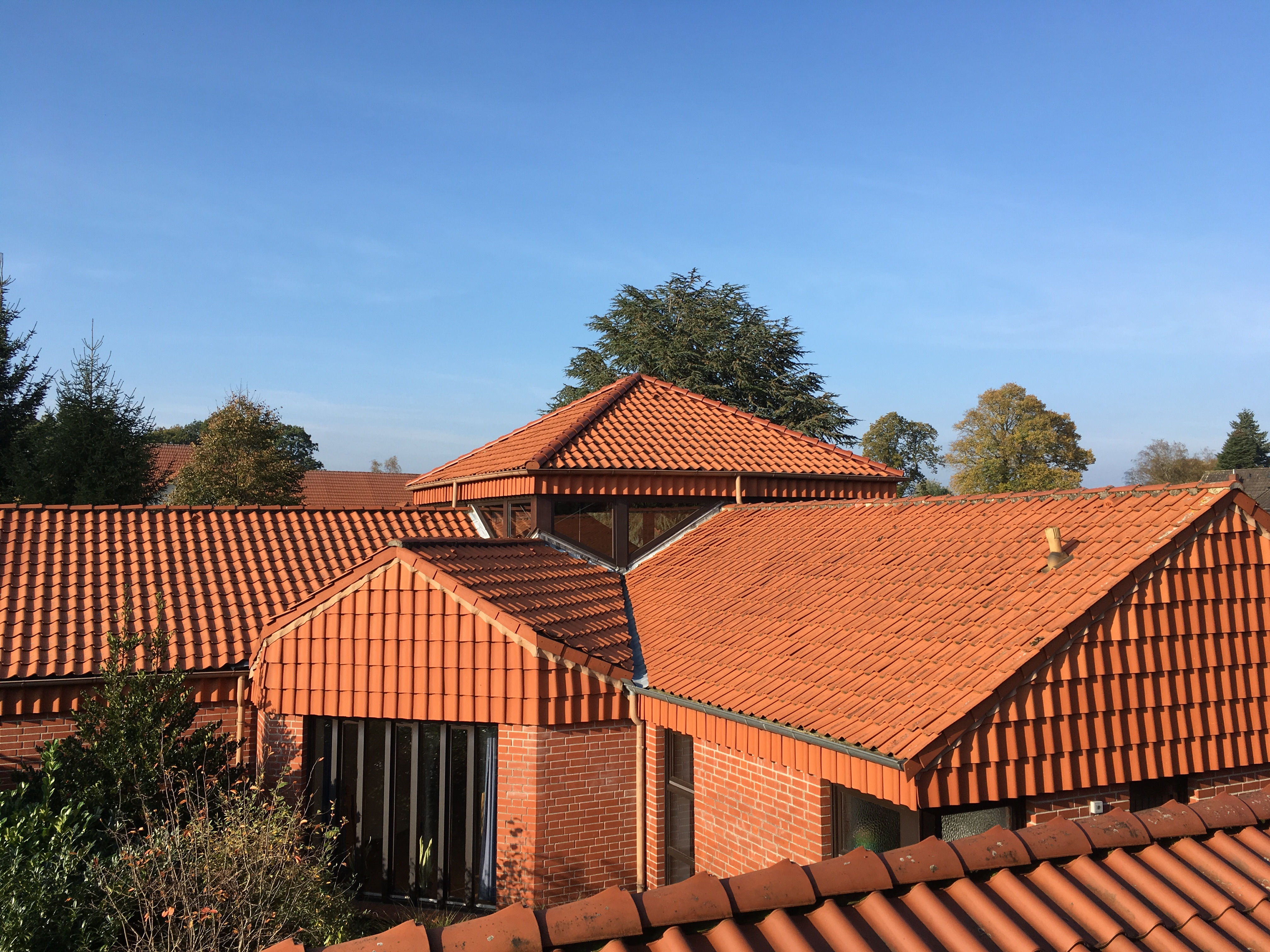 Die Faltdächer des Gemeindezentrums in Bassen (ev.-luth. St.-Petri-Kirchengemeinde Oyten), welches aus der Vogelperspektive einen kreuzförmigen Grundriss zeigt.